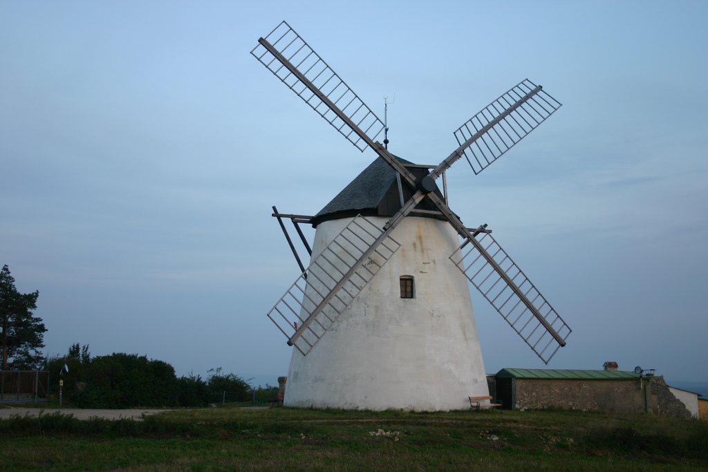 Eine der letzten funktionsfähigen Windmühlen in Österreich befindet sich in Retz im Weinviertel. geotagged